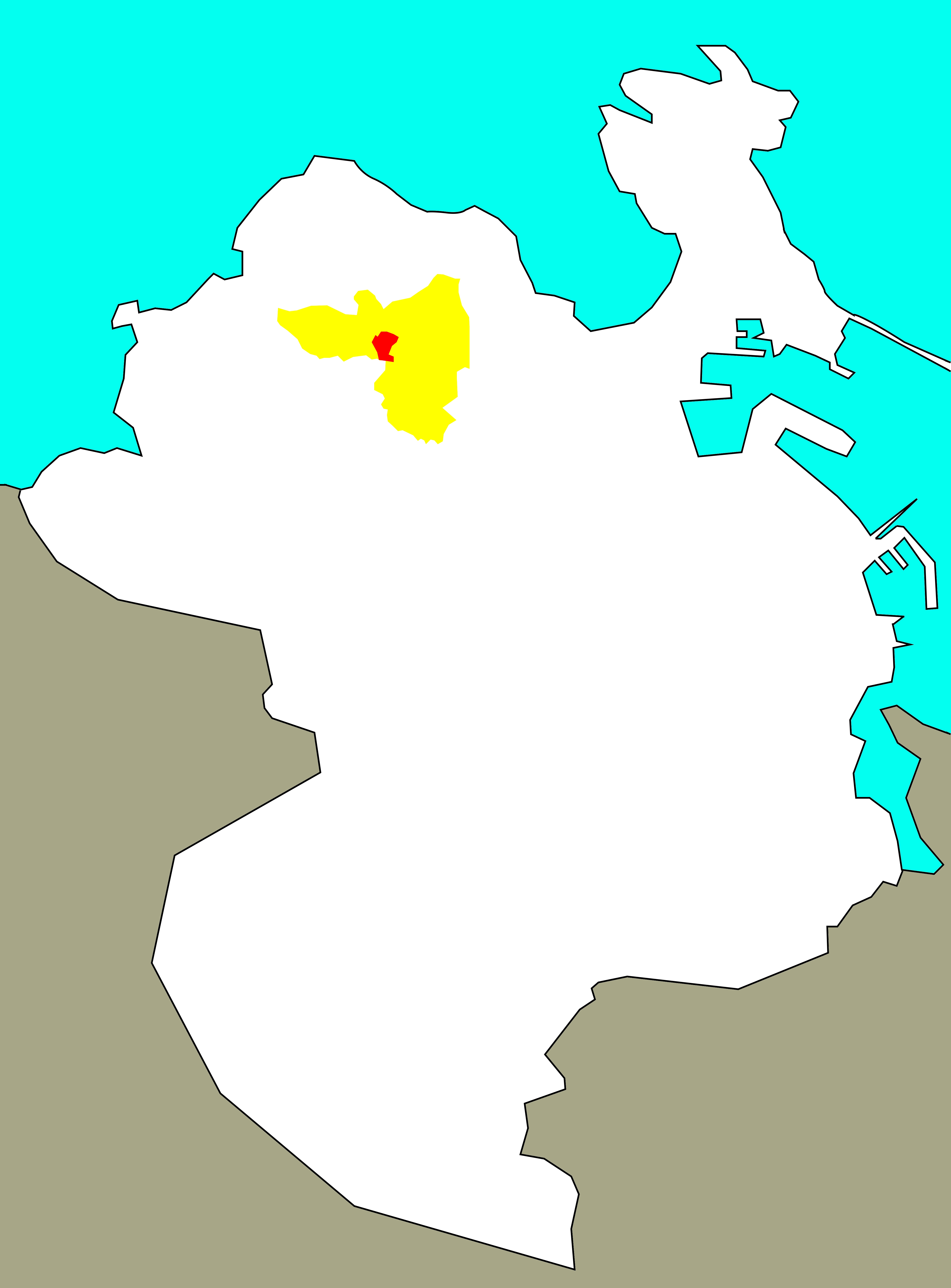 Situación de Loureiro no "barrio-territorio" de San Pedro de Visma.[1]